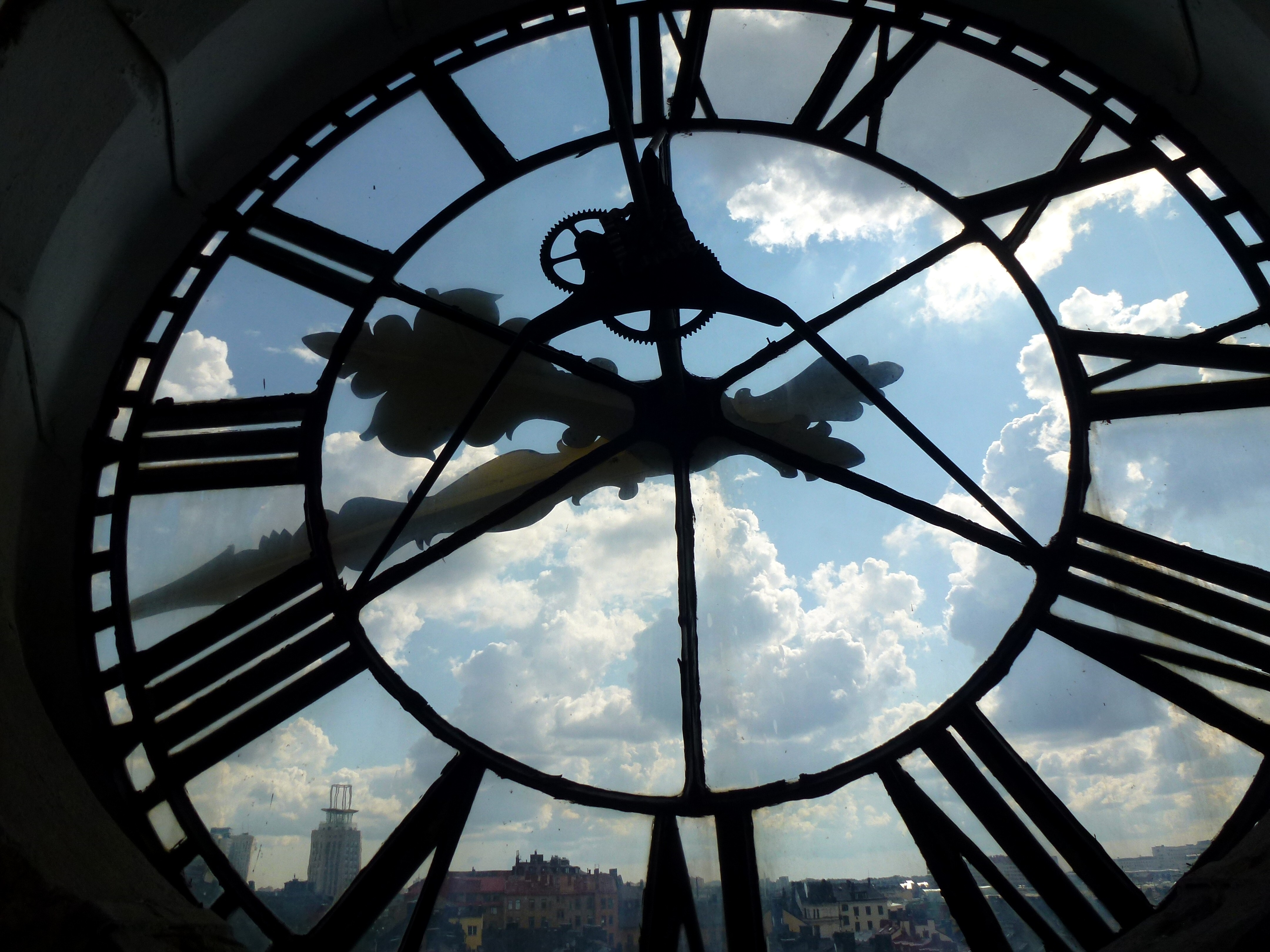 Maria Magdalena kyrkans tornur inifrån